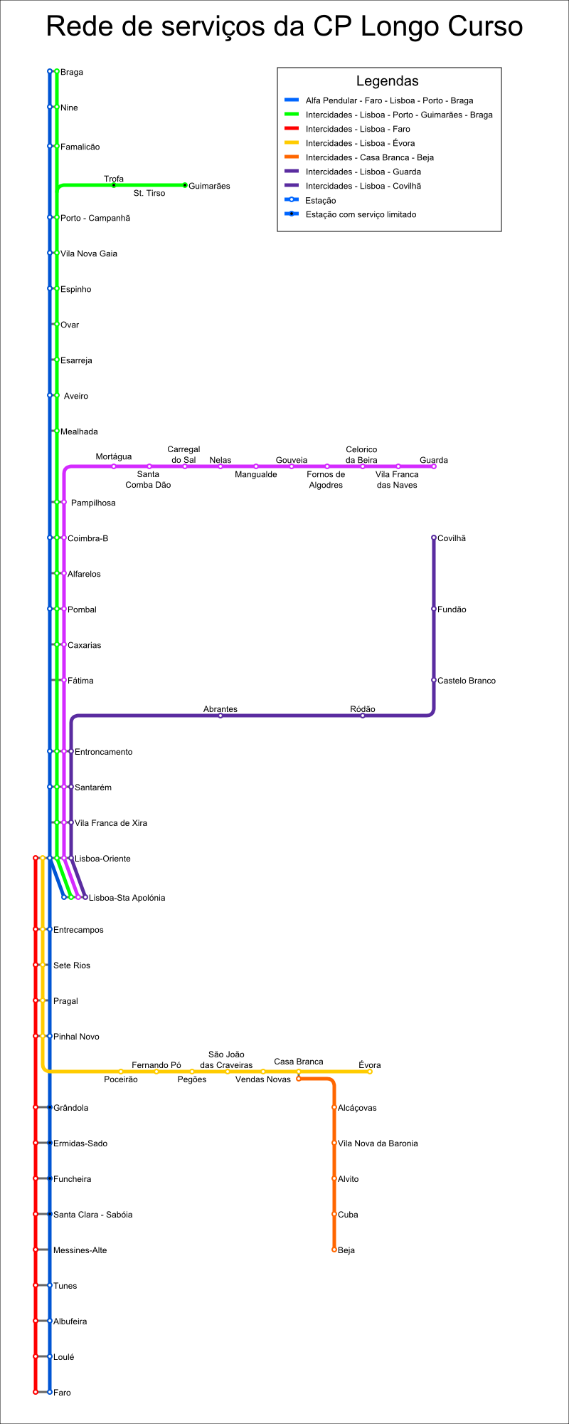 Rede de Longo Curso